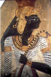 Ahmose-Nefertari, Gran Esposa Real del faraón Amosis I (c.1550 A.C.)